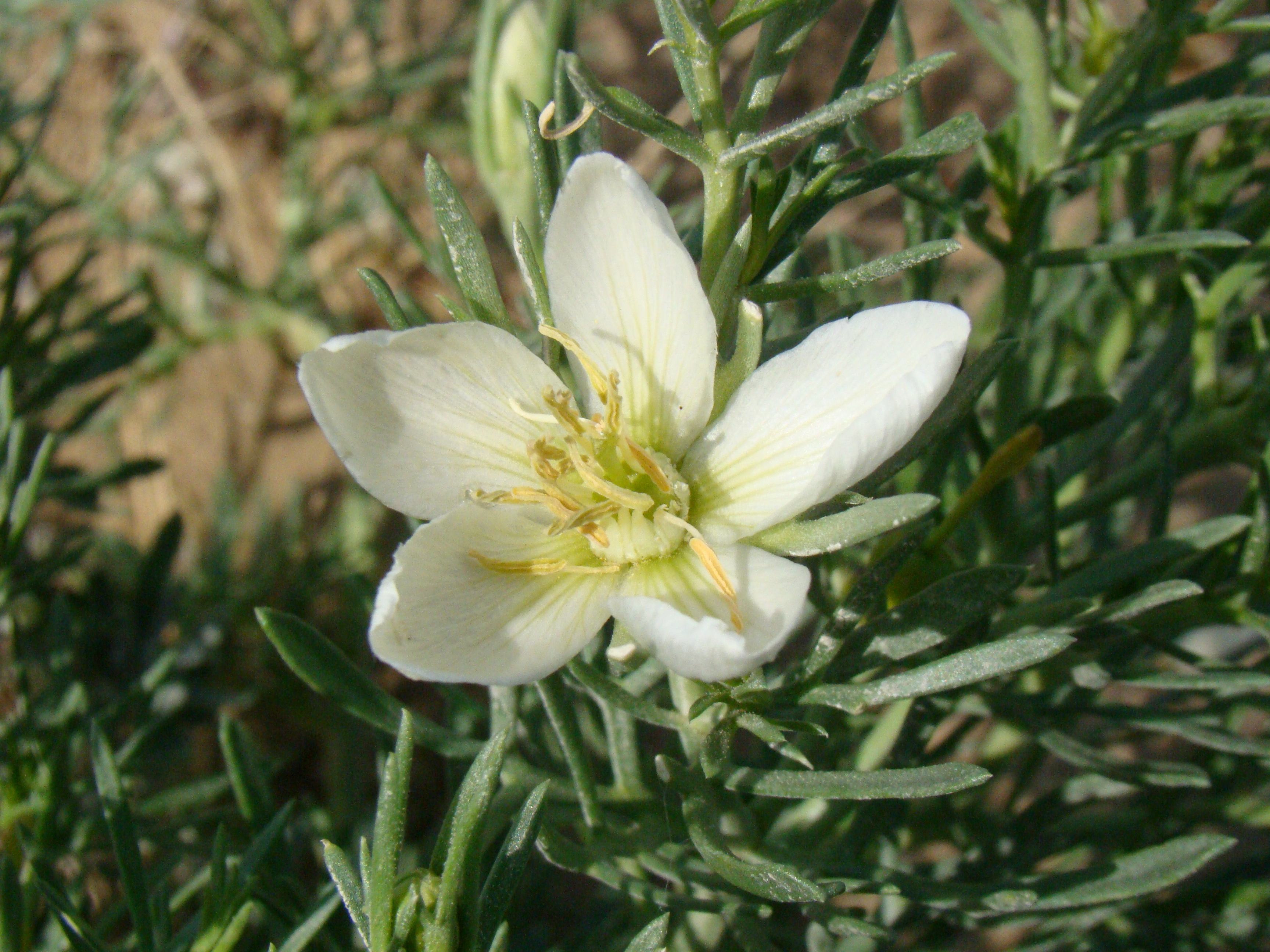 Гармала (Peganum harmala). Окрестости города Байконур, Казахстан